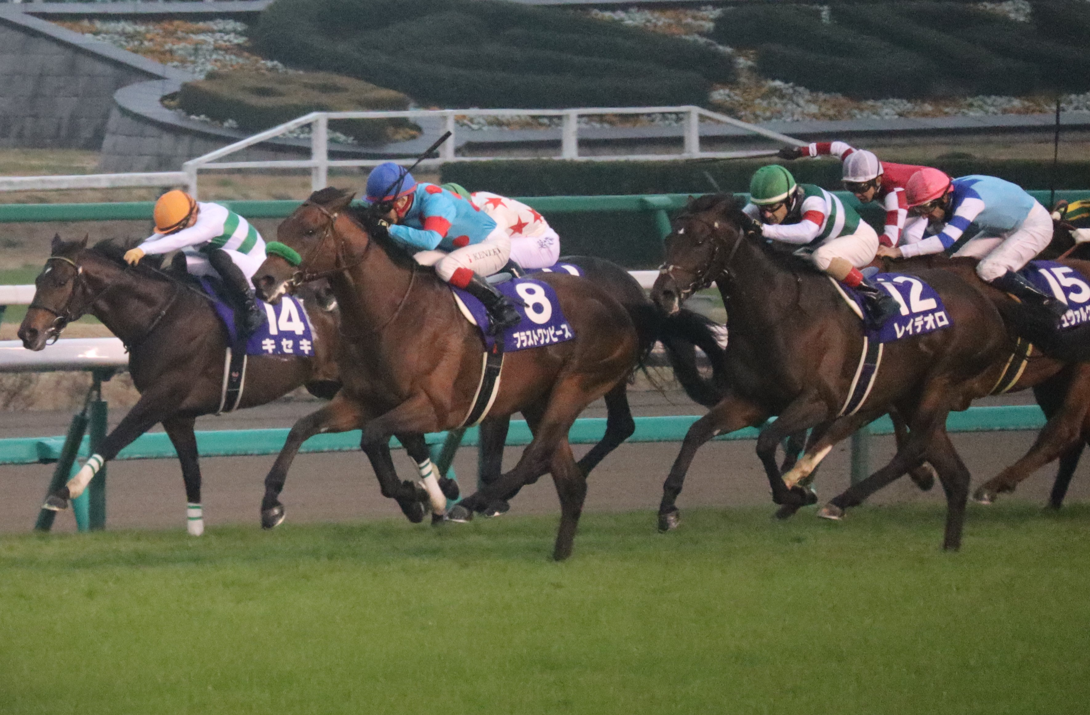 第63回有馬記念出走時(2018年12月23日)